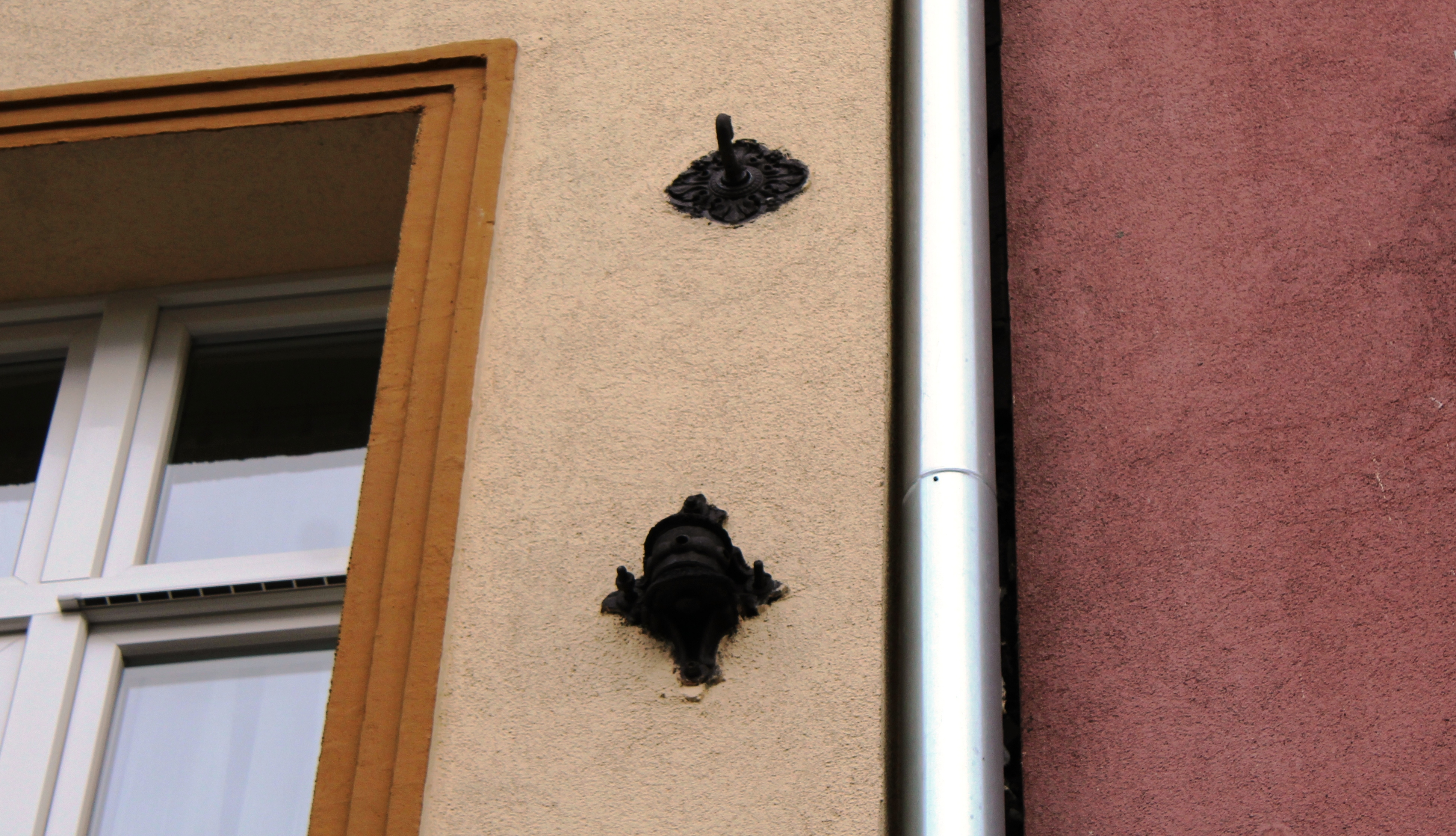 Zabytkowe uchwyty do mocowania sieci trakcyjnej, tzw. rozety w Szczecinie